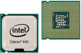 µP-System